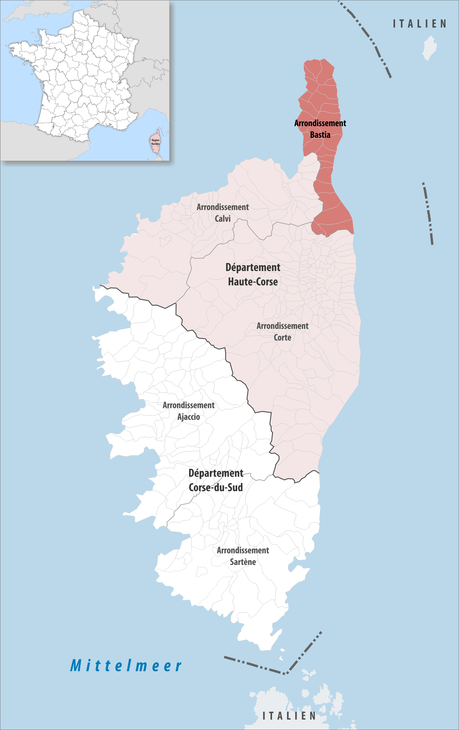 Lage des Arrondissements Bastia